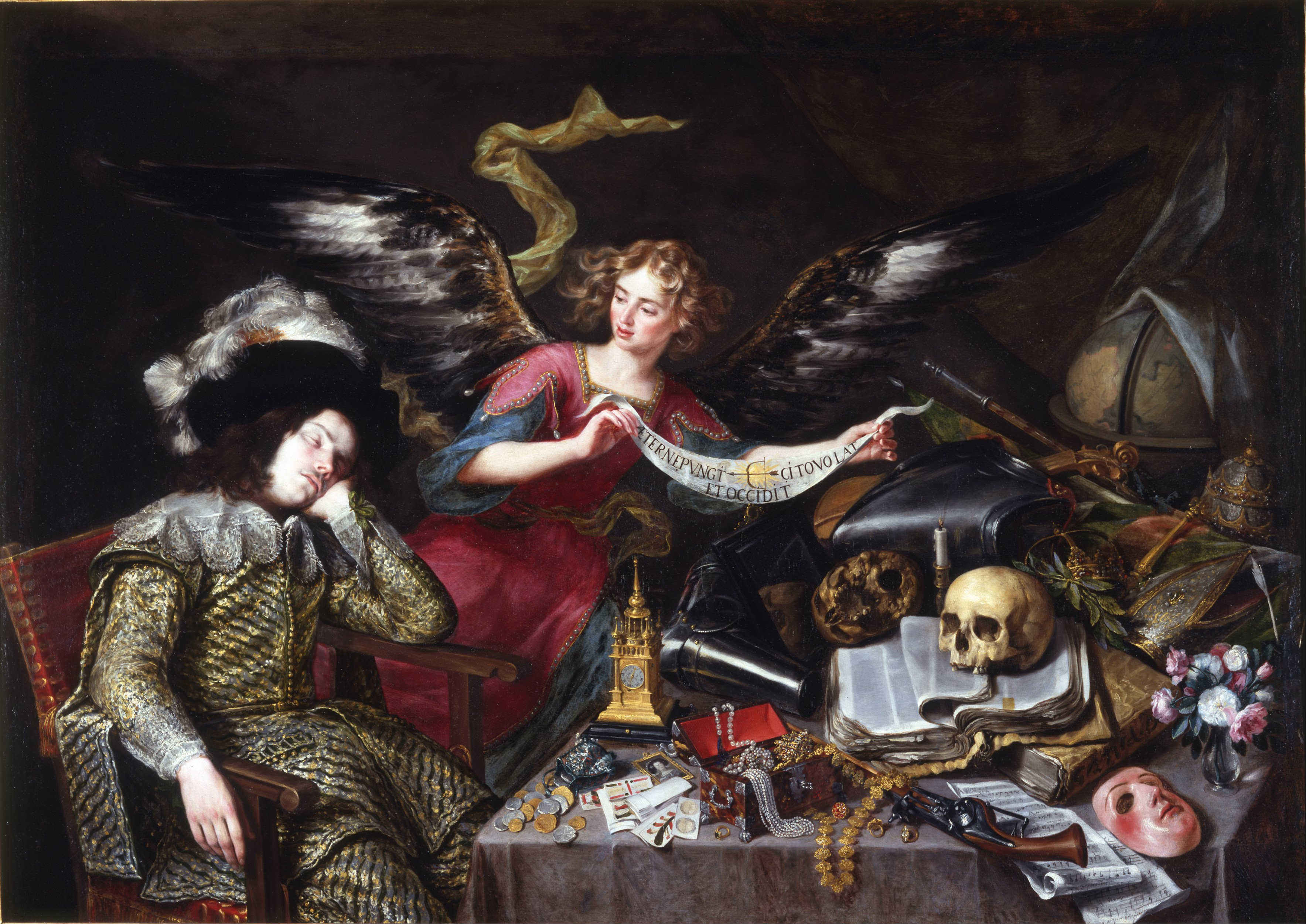 La obra representa a un caballero del siglo XVII vestido con la indumentaria de la época y dormido mientras un ángel le muestra el carácter efímero de los placeres, las riquezas, los honores y la gloria. El ángel le muestra el jeroglífico de la fecha sobre el sol, que hiere, vuela raudo y mata. El conjunto de objetos situados sobre la mesa constituye un auténtico bodegón en el que se establece una condensación de símbolos y alegorías. Los símbolos de la mesa son muy complejos, pero destacan algunos por su presencia continua en todas las "vanitas": la calavera que simboliza la muerte, la máscara de teatro sobre la hipocresía, las joyas y el dinero que son las riquezas que no podemos llevar al otro mundo, la baraja y las armas como el juego y los placeres de la caza, el reloj que indica el paso inexorable del tiempo, la vela apagada que indica la extinción de la vida... son innumerables los objetos y los múltiples significados engarzados que podemos entresacar de todos ellos. El pintor ha representado un "corpus" de los objetos de la vanidad del mundo y de su sin sentido tratados con una definición magistral que los individualiza como forma de acentuar, a través de lo real, la presencia de su carácter didáctico, alegórico y moral.